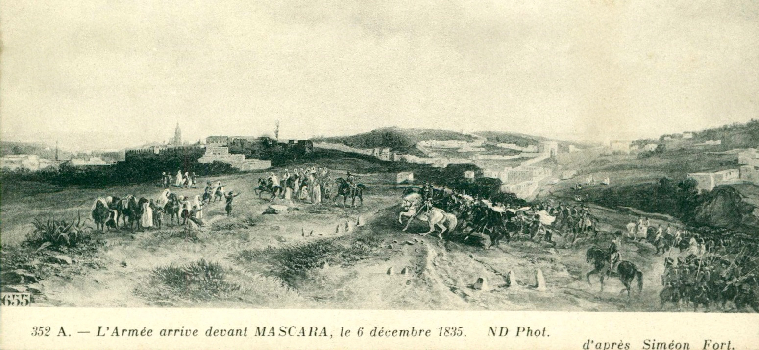 L'armée devant Mascara, 6 décembre 1835. Carte postale ancienne, vers 1905